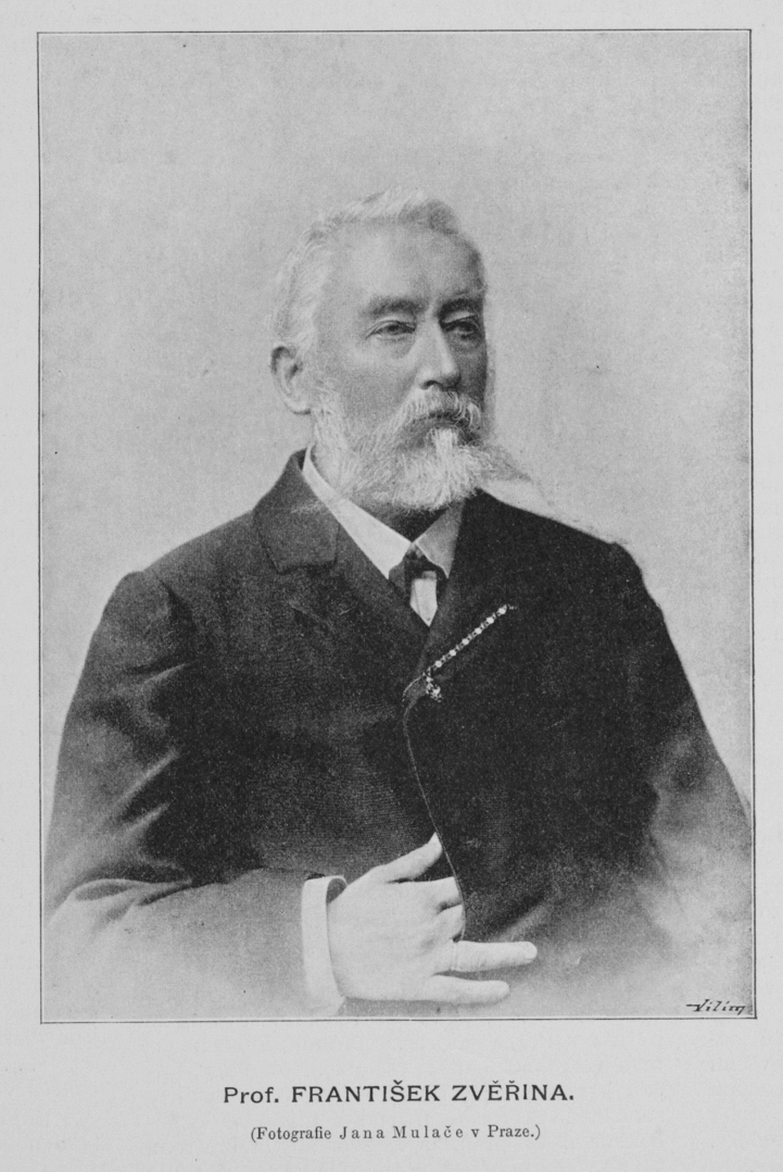 Portrait of František Bohumír Zvěřina (1835-1908), Czech painter